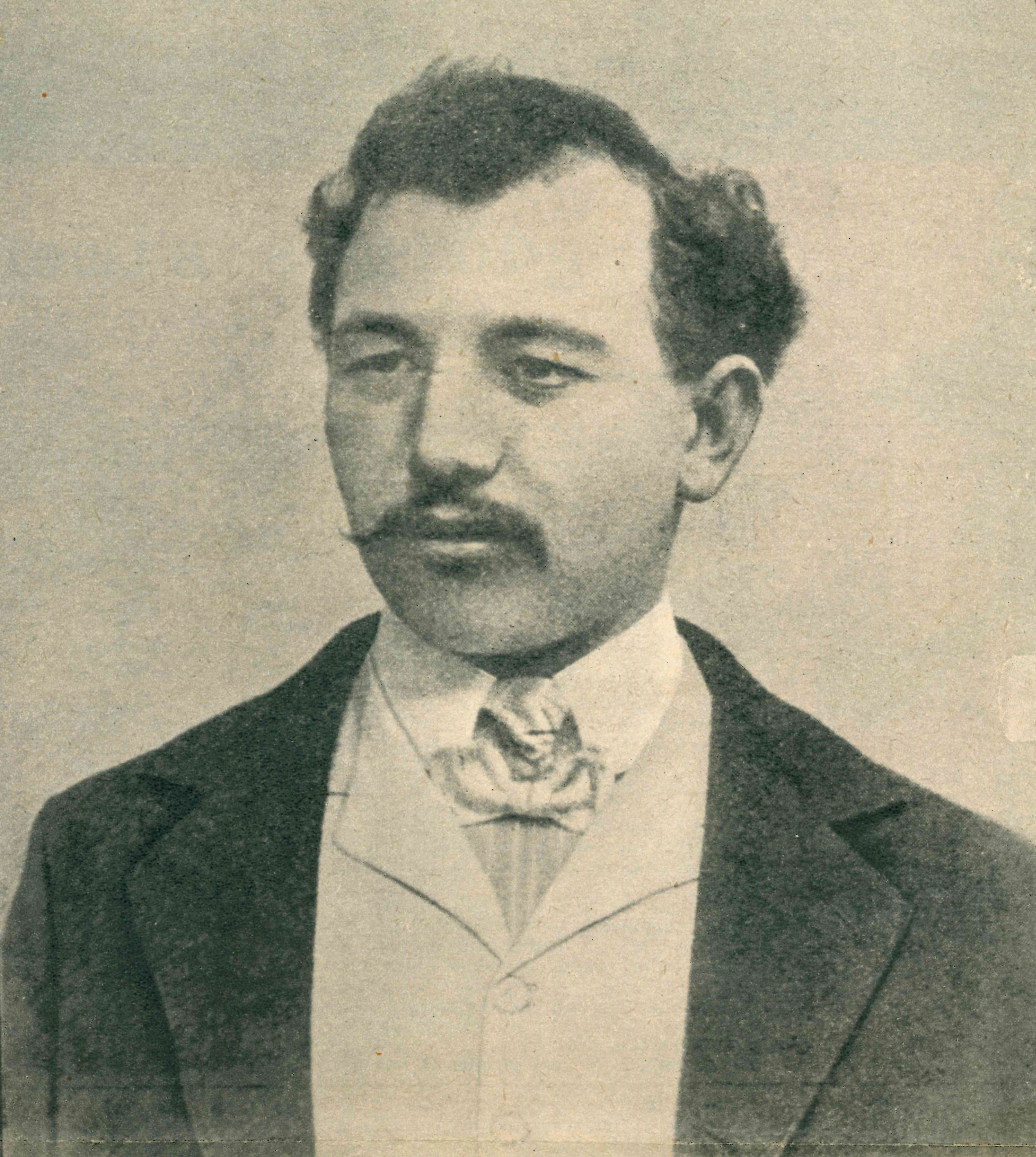 Portrait de Jules Durand, syndicaliste havrais victime de la plus grande erreur judiciaire de XXe siècle en France.